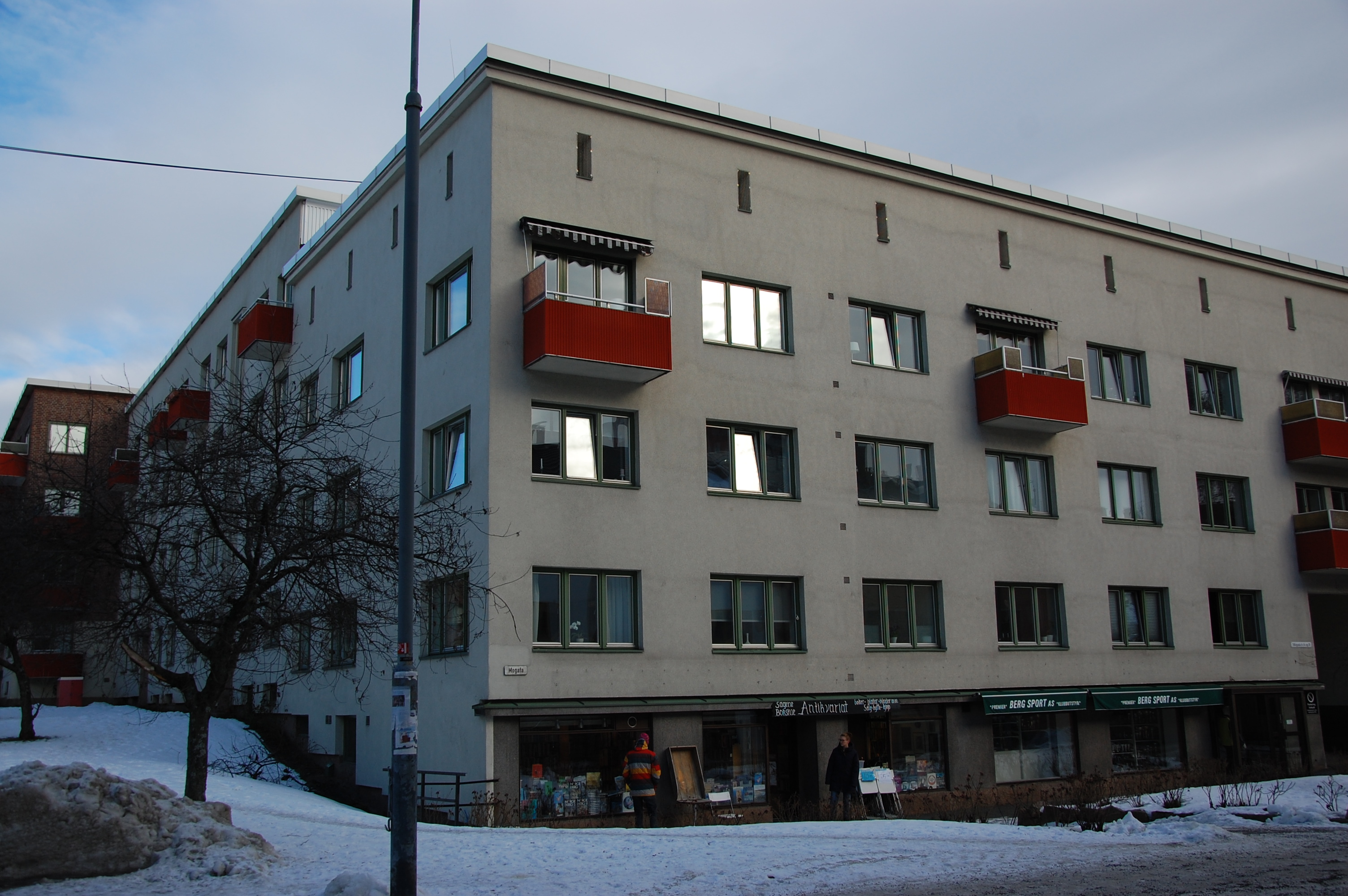 Sandefjordgata 5 på hjørnet av Mogata. Tilhører bygårdsanleggene Moløkken/Bjølsenborgen/Sandefjordgata - inkl. Grimstadgata, Kongsvingergata, Mogata, og Tønsberggata. Lokaliteten består av Sandefjordsgata byggeselskap, Moløkkens kooperative byggeselskap og Bjølsenborgens eiendommer. Arkitekt var Victor Schaulund, og bygårdene er oppført i perioden 1933-1940. I første etasje sees antikvariatet Sagene bokstue til venstre.